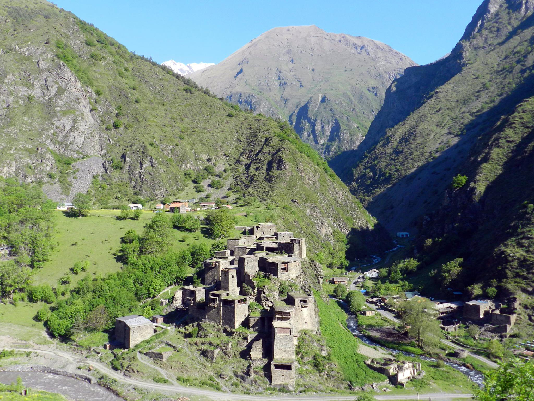 პირიქითა ხევსურეთი სოფელი შატილი